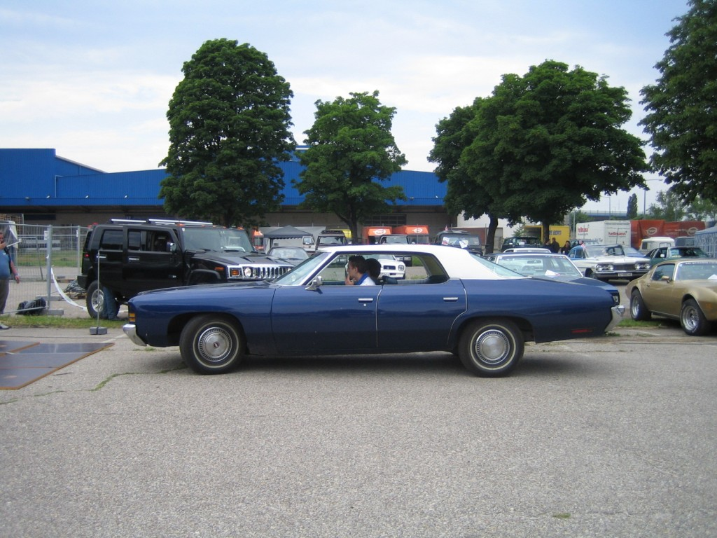 1972 Chevrolet Impala Sport Sedan, V8 Big-Block 6.6l (350cui)